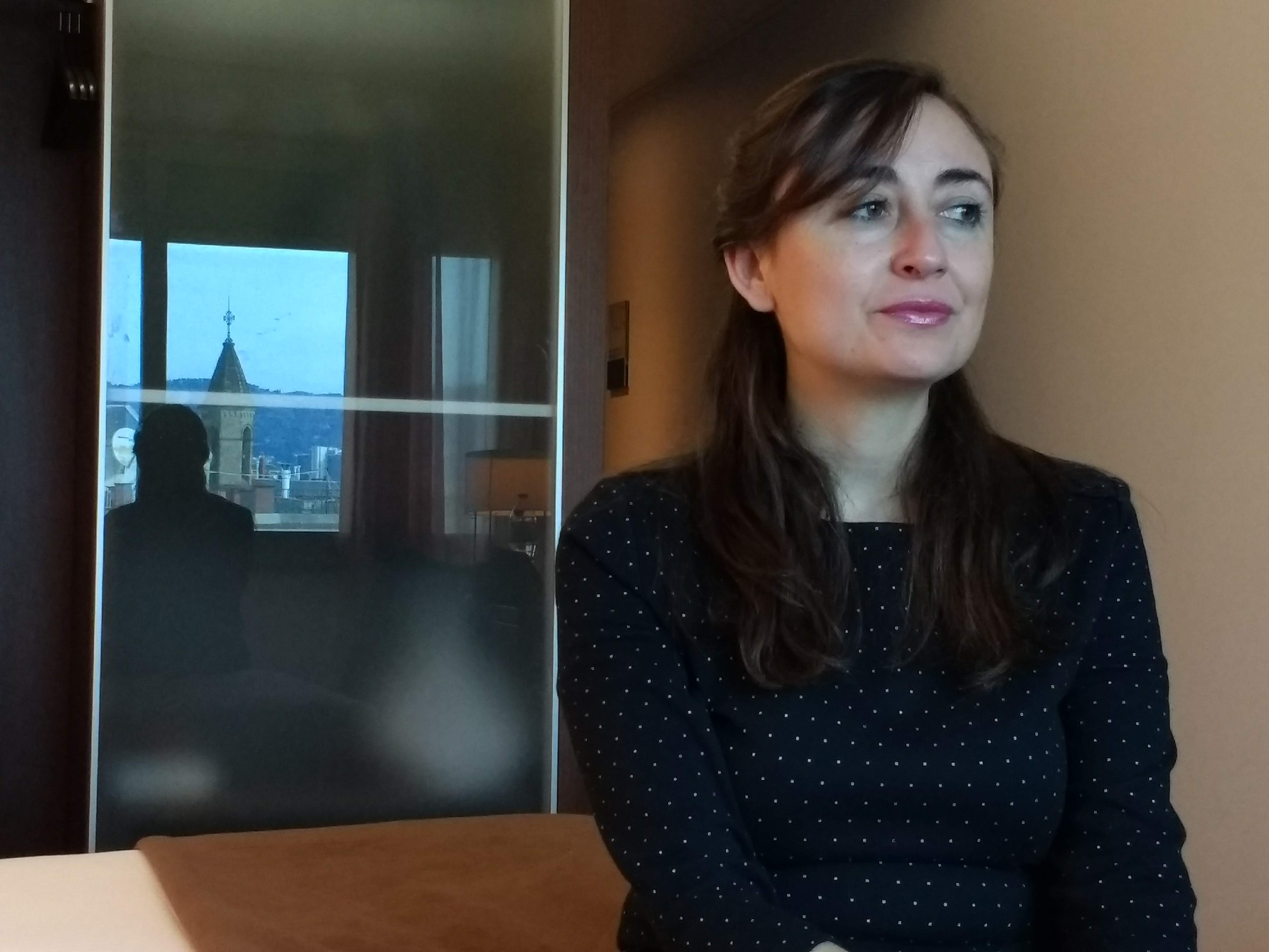 Copyright Rubén Bastida